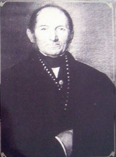 Adolf Maria Pinkas (1800 - 1865), Český politik.